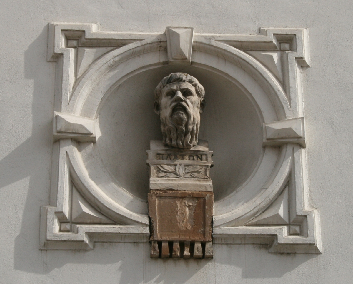 Platon, rad Rudolfa Valdeca na Hrvatskom institutu za povijest, Zagreb